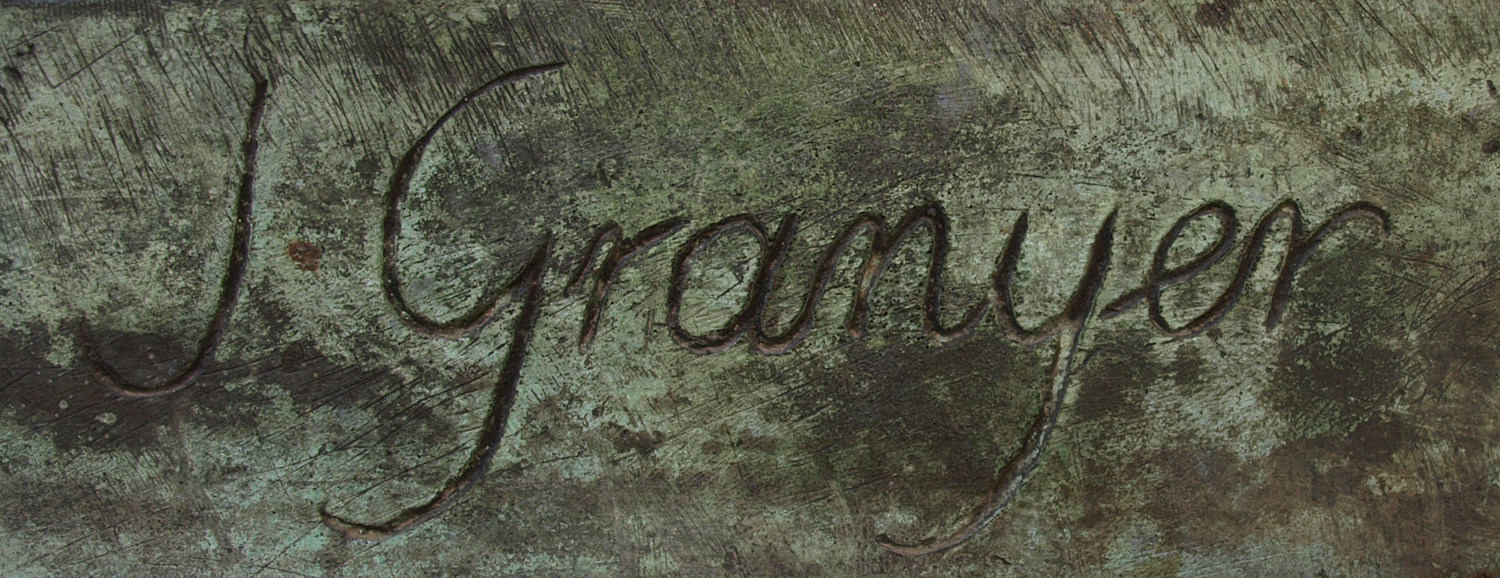 Toro pensant (Josep Granyer, 1972)